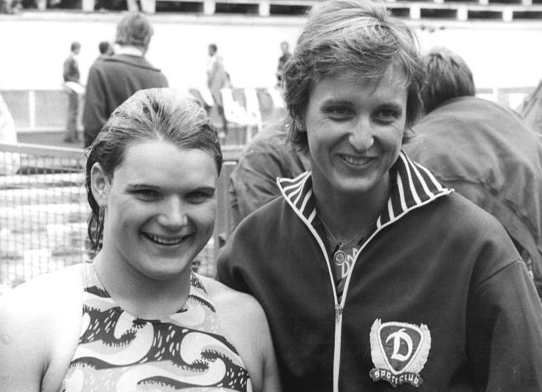 Andrea Pollack, Babara Krause ADN-ZB 04.07.78 Berlin: 29. DDR- Meisterschaften im Sportschwimmen- Sie sorgten für die ersten Paukenschläge der diesjährigen Titelkämpfe: Andrea Pollack (1.) mit ihrem neuen Weltrekord über 100 m Schmetterling (59,46 s ) am 3.7. und Babara Krause (r.-beide SC Dynamo Berlin) am Vortag mit der neuen Weltrekordzeit über 200 m Freistil (1:59,04).